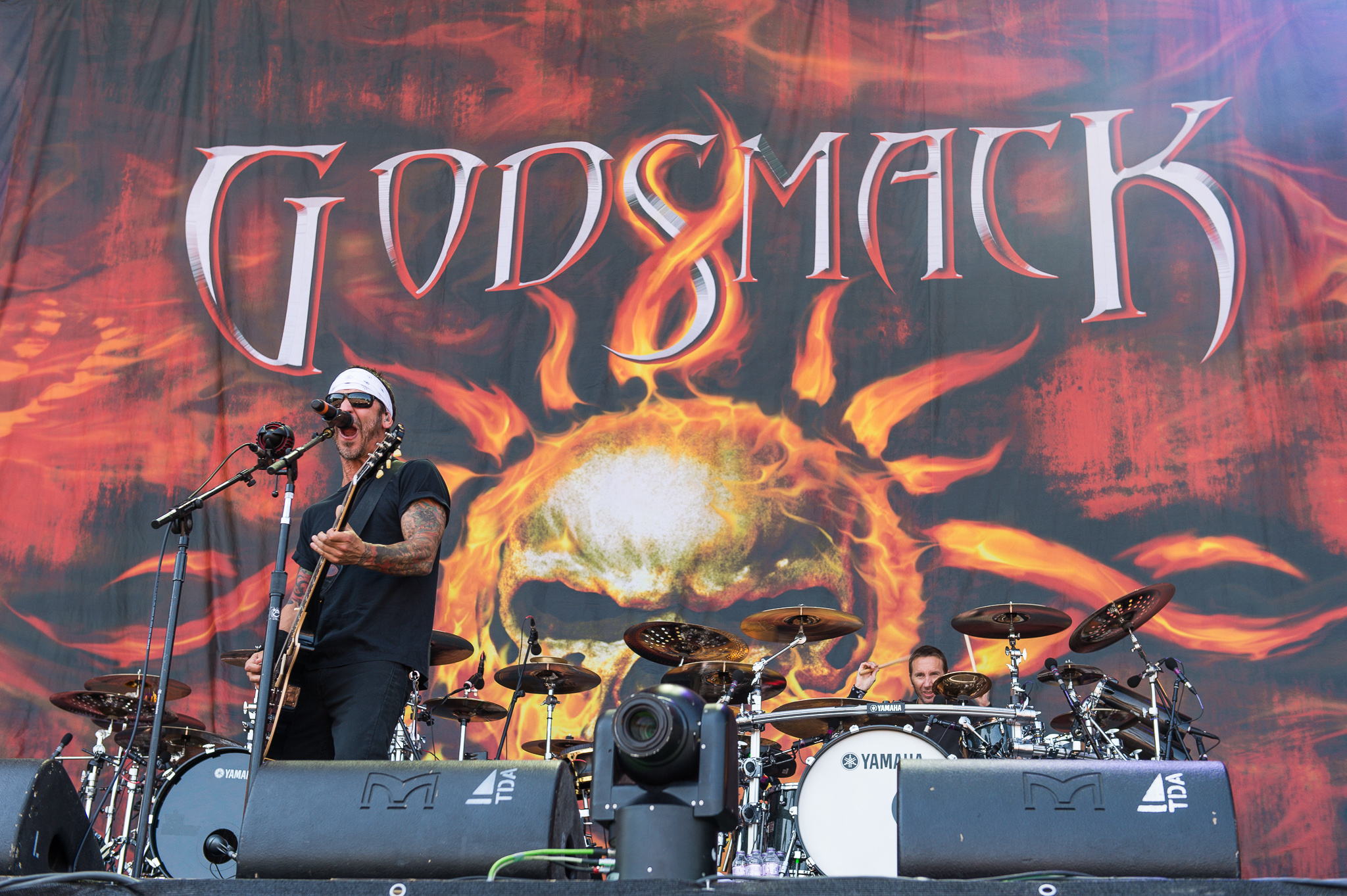 ARGO-Konzerte,Beck's Park Stage,Festival,Godsmack,James Shannon Larkin,Konzert,Livekonzert,Livemusik,Musik,RiP,Rock im Park 2015,Salvatore Paul Erna,Shannon Larkin,Sully Erna